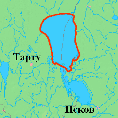 Место Чудского озера в Псковско-Чудском озёрном комплексе